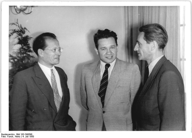 Illus-Funck 4.7.50 Deutscher Schriftsteller-Kongreß in Berlin. Vom 4.-6.7.50 findet in Berlin anläßlich des 5-jährigen Bestehens des Kulturbundes zur demokratischen Erneuerung Deutschlands ein deutscher Schriftsteller-Kongreß statt. UBz: (v.l.n.r.) Wolfgang Joho, Borowski (Polen) und Jastrun (Polen) im Gespräch. 7099-50